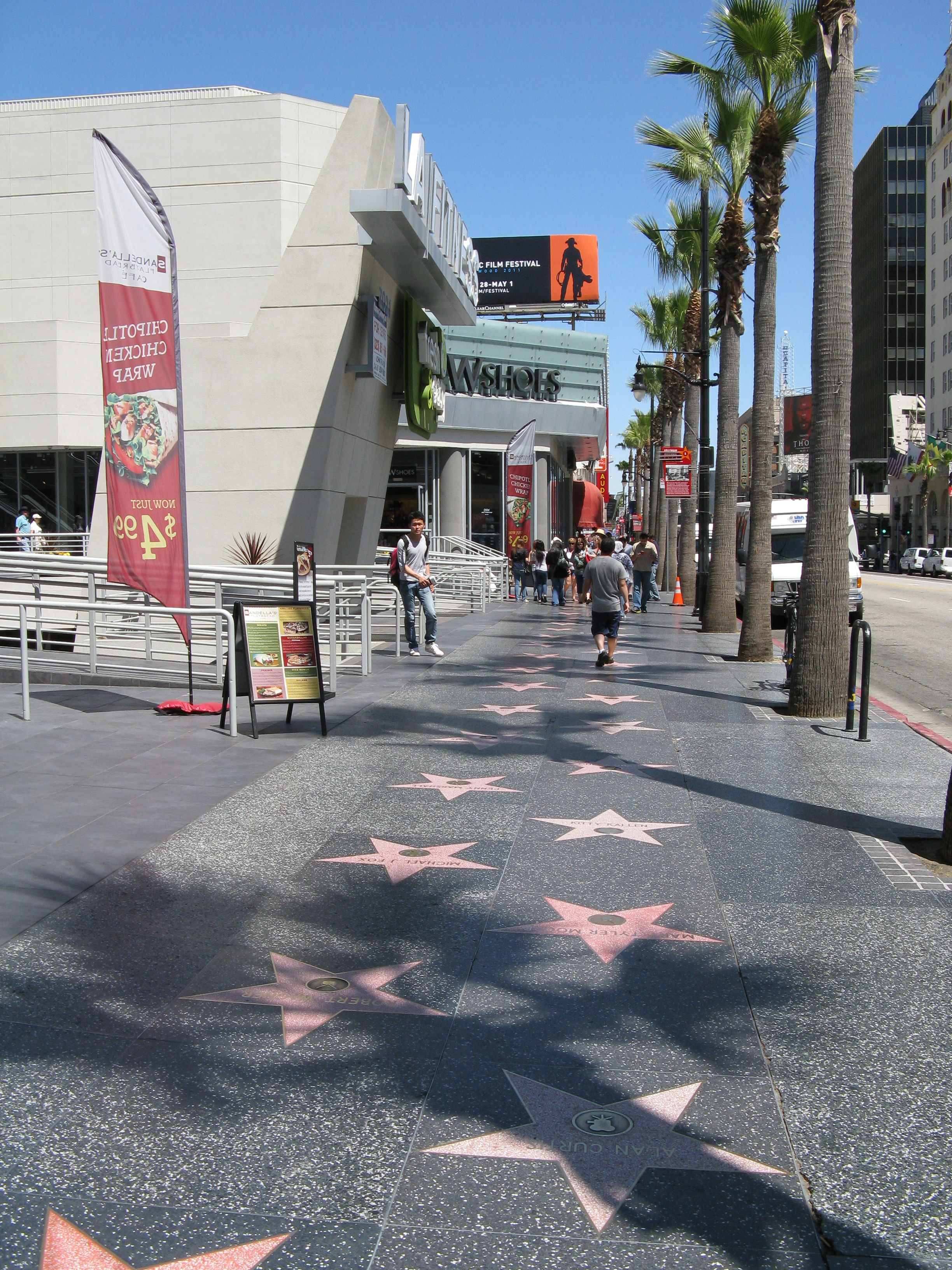 LA Fitness